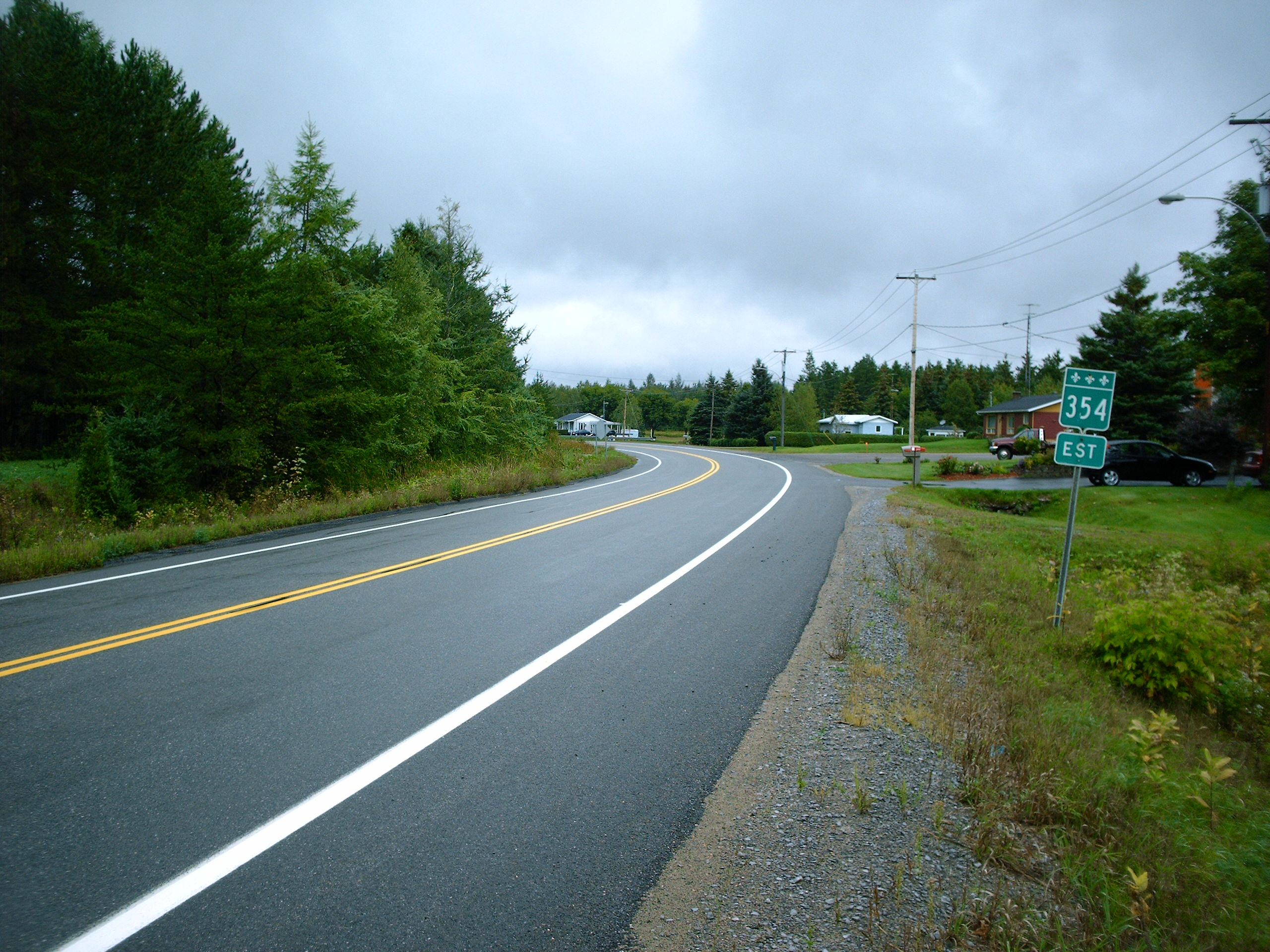 Route 354 au Québec